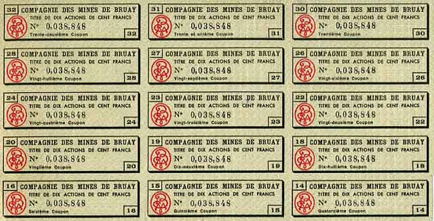 Coupons d'une action de la Compagnie des mines de Bruay.